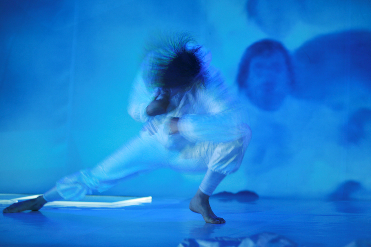 Die 2007 von Saskia Höbling entworfene Choreografie cat freeze 2